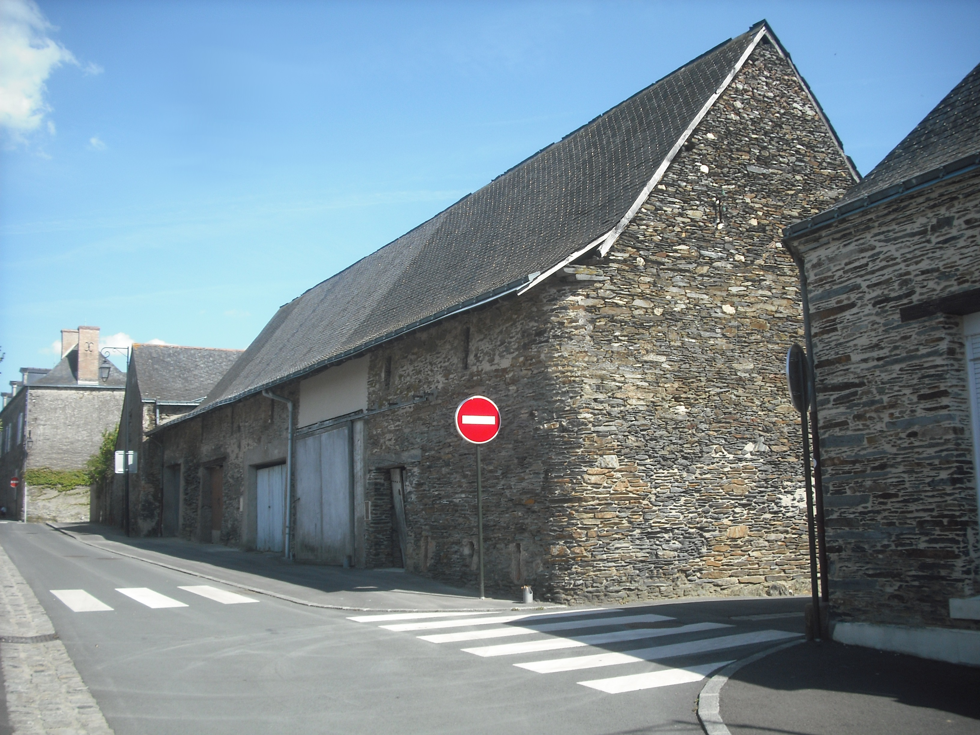 Ancien grenier à sel, Candé, Maine-et-Loire, France.